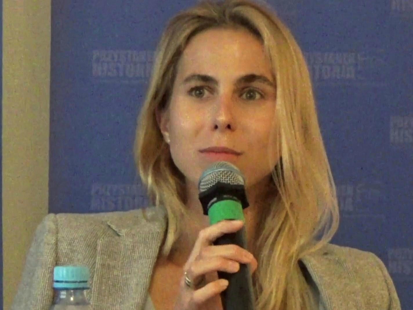 Anna Herbich, dziennikarka.